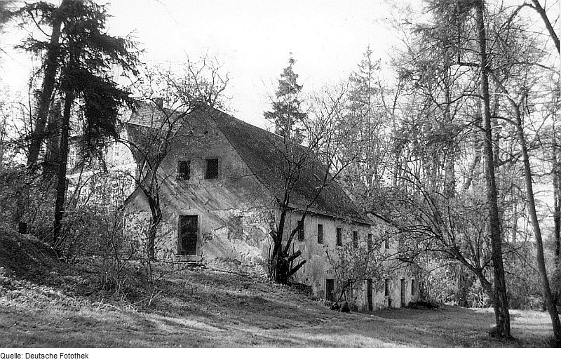 Original image description from the Deutsche Fotothek Panschwitz-Kuckau-Neustädtel. Ehem. Mühle unterhalb des Gutes (links)